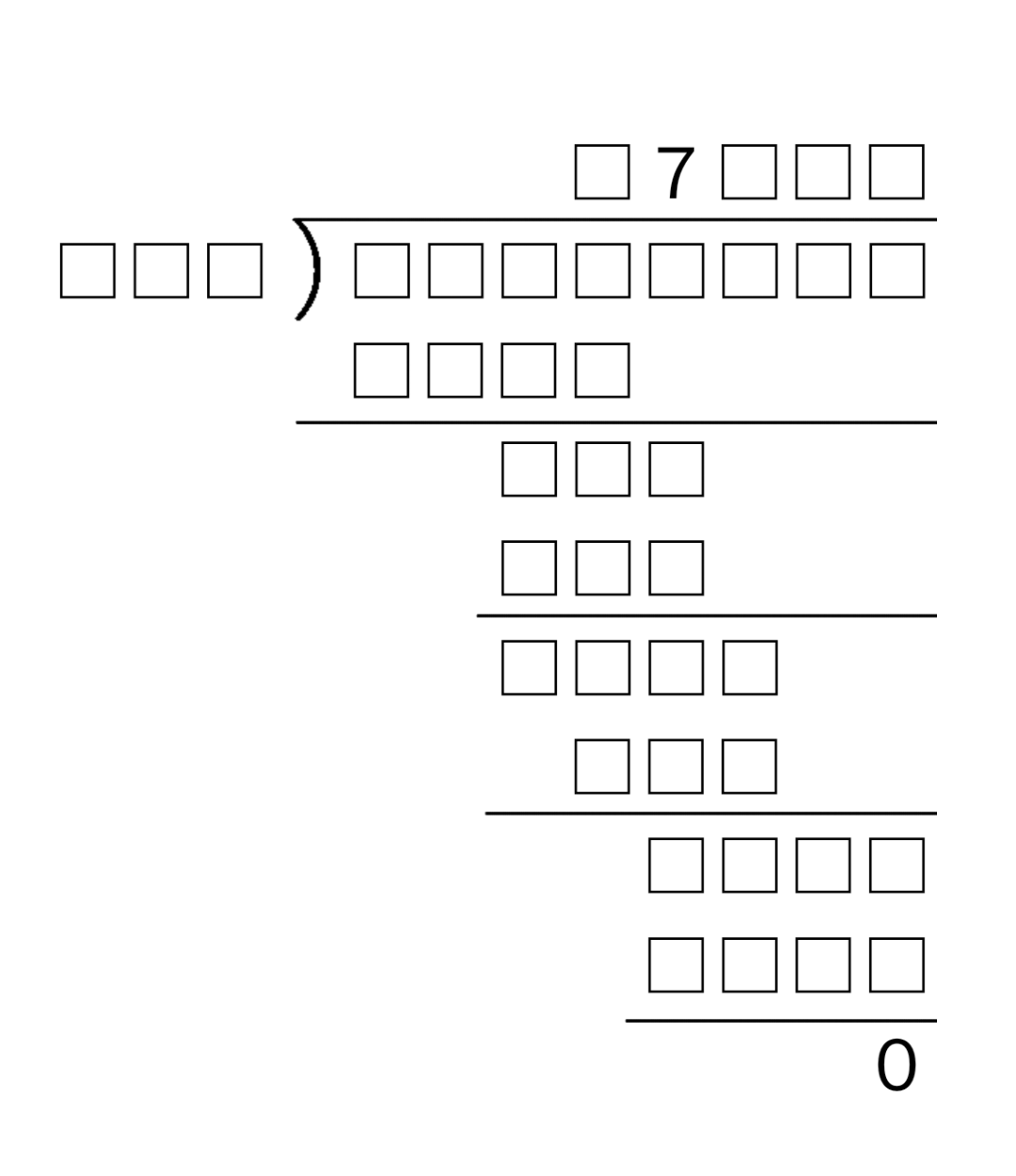 E.F.オドリングによって作られた著名な虫食い算の問題。明らかになっている数字が7と0だけであることから「孤独の7」という名前がついた。